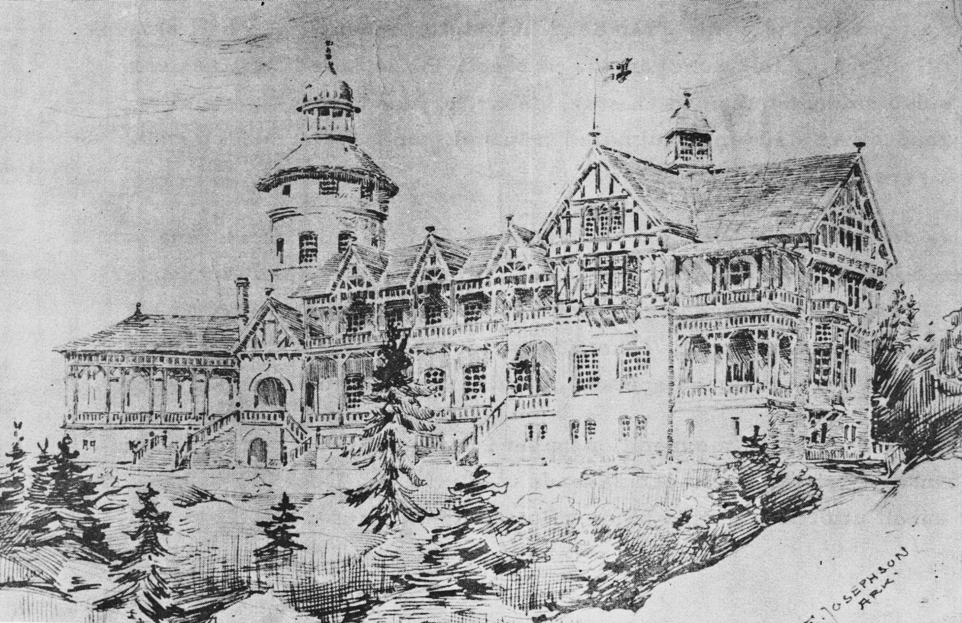 Illustration över Grand Restaurant på Restaurangholmen